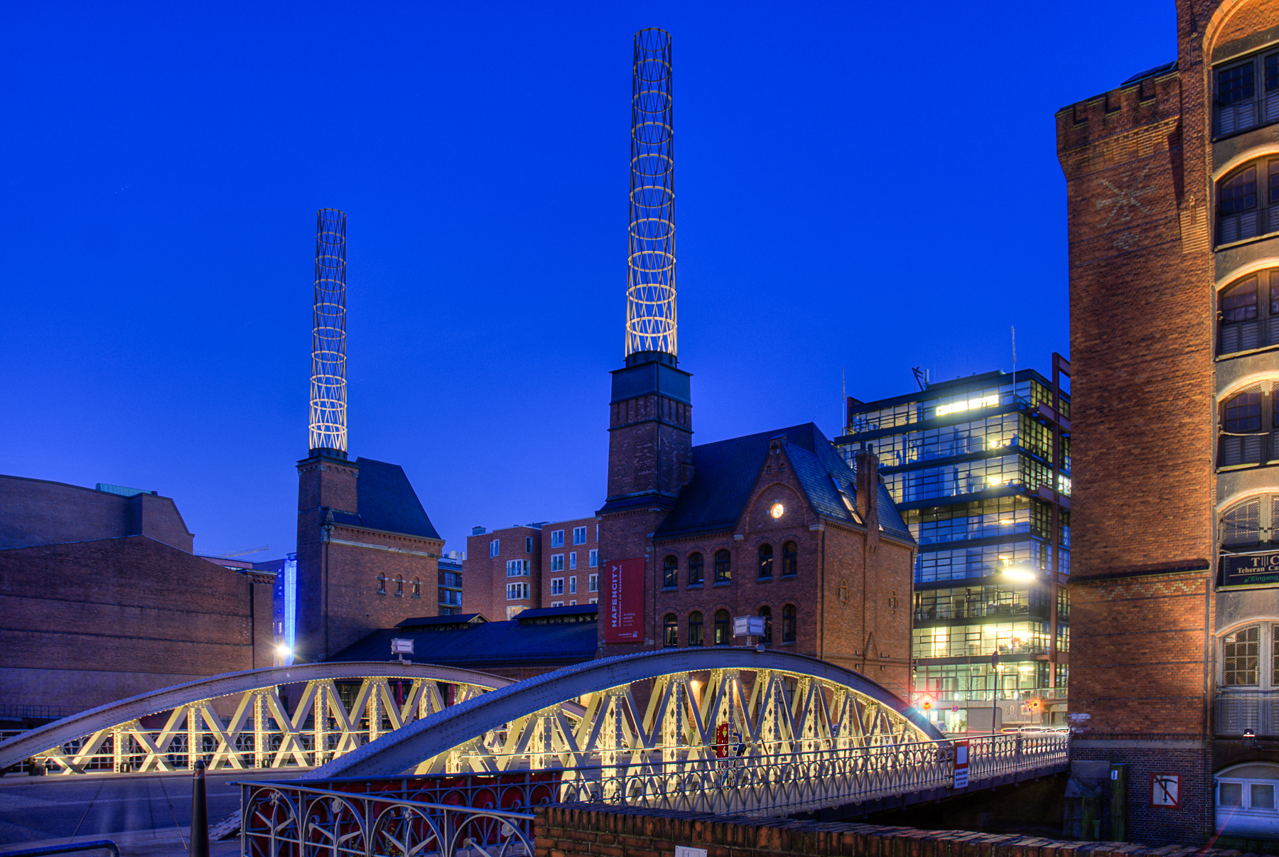 Die Speicherstadt in Hamburg ist der größte auf Eichenpfählen gegründete Lagerhauskomplex der Welt und steht seit 1991 unter Denkmalschutz.This is a photograph of an architectural monument.